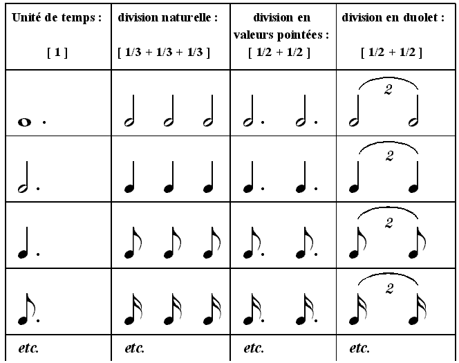 Description : Equivalence des duolets Source : Personnelle Licence : GFDL